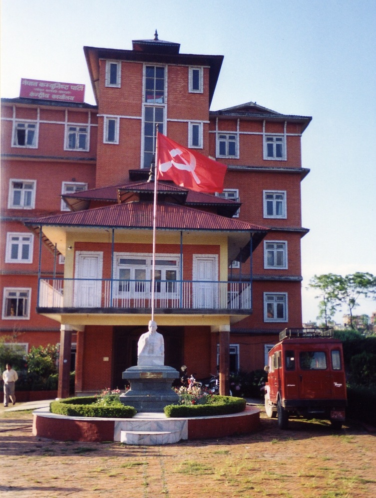 Komunistyczna_Partia_Nepalu_(Zjednoczenie_Marksistowsko-Leninowskie)